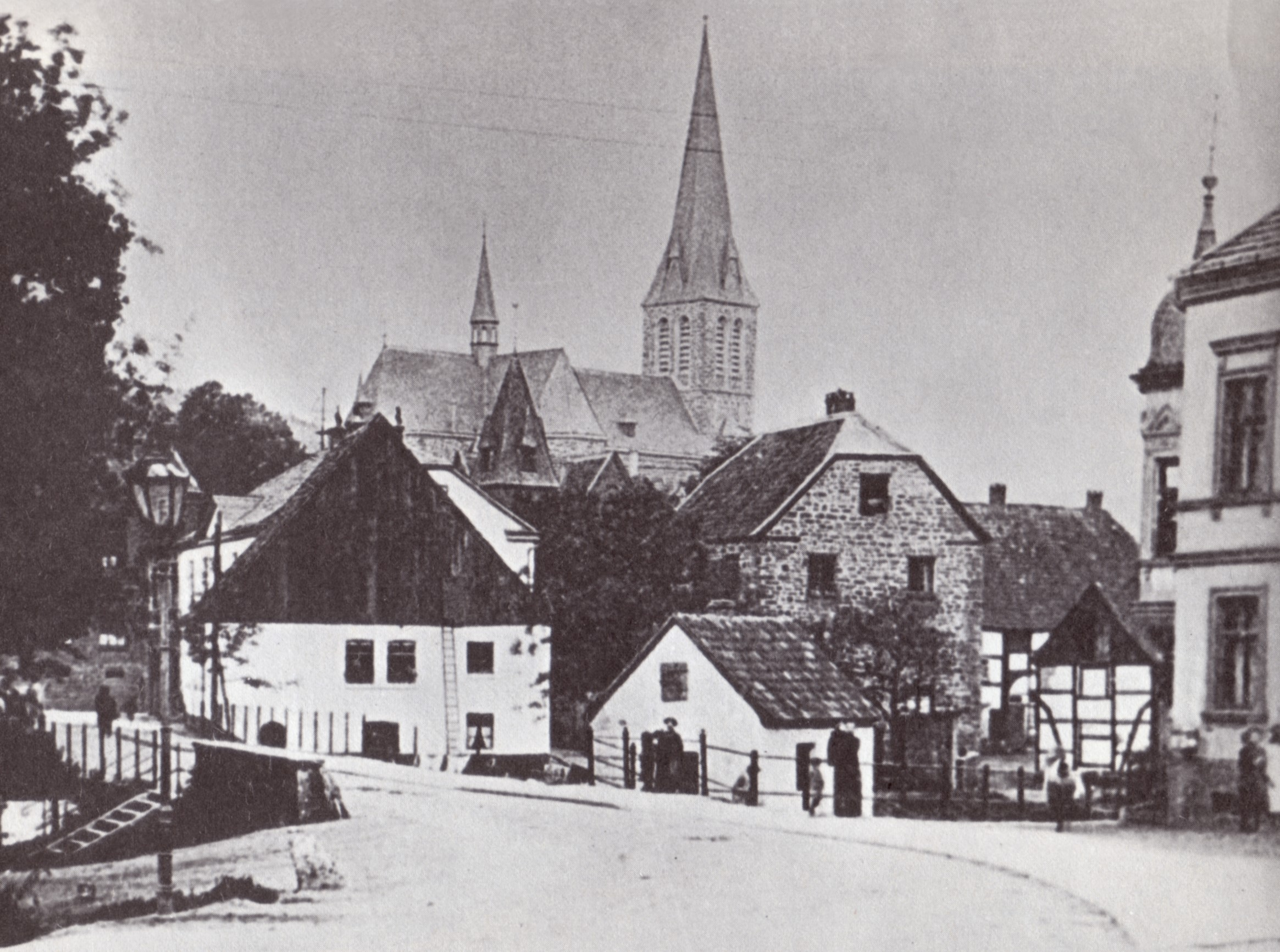 1906: Hönnetalstraße in Sundwig mit katholischer Pfarrkirche St. Bonifatius. Sundwig war 1906 verwaltungsmäßig dem Amt Hemer zugeordnet.